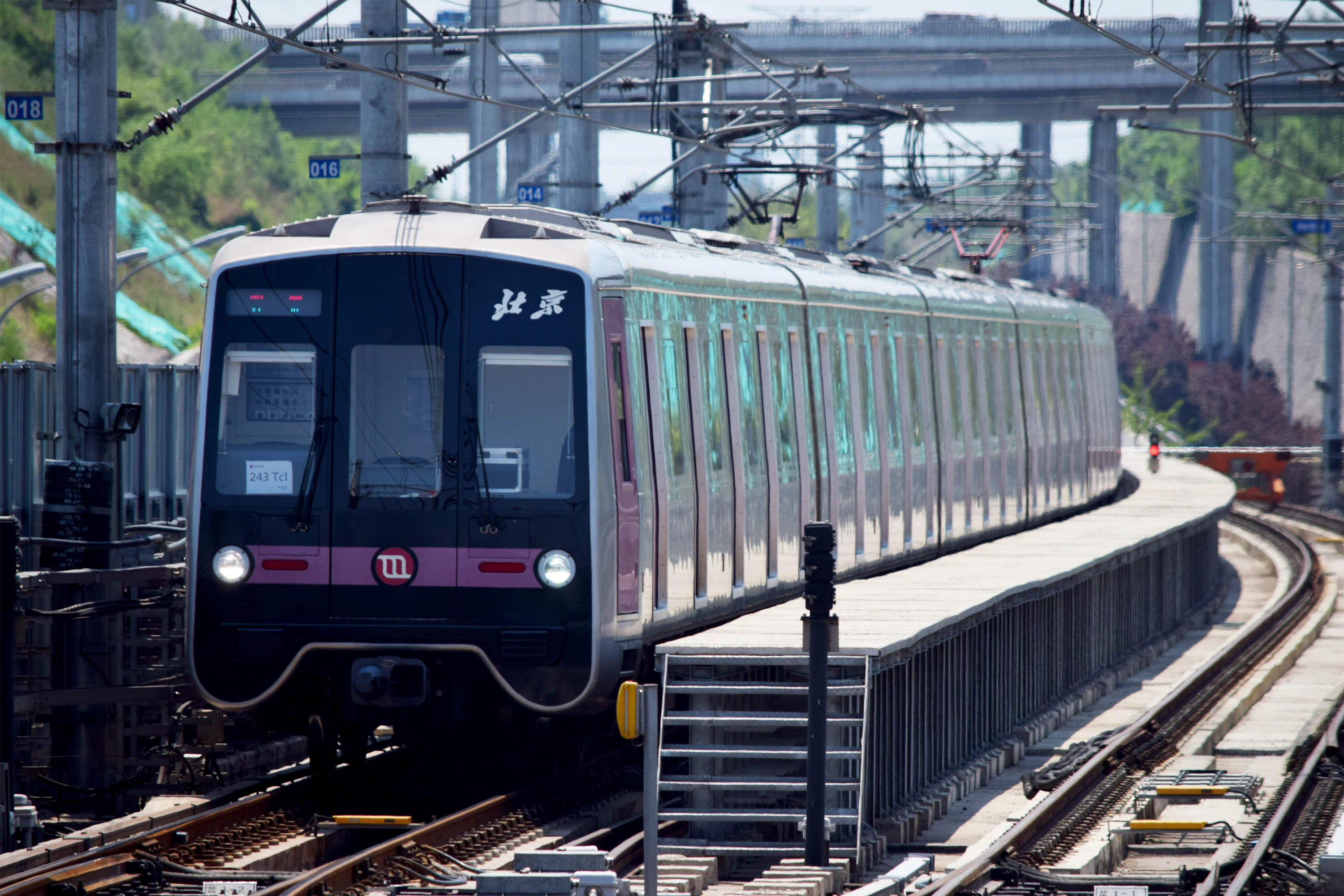 中文（中国大陆）: 一列SFM18电动车组正在张郭庄站折返。